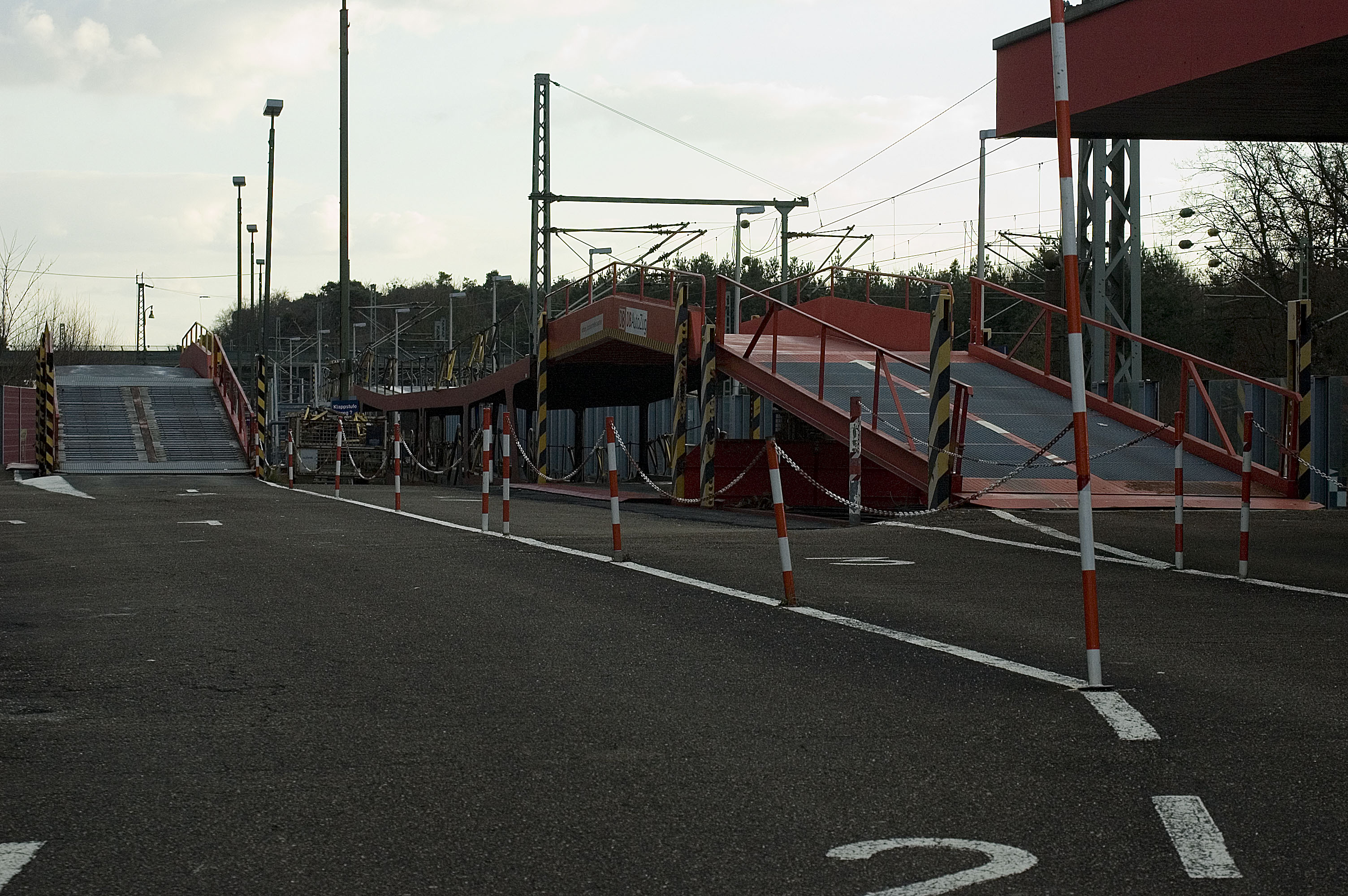 ARZ Terminal des Bahnhofs Neu-Isenburg